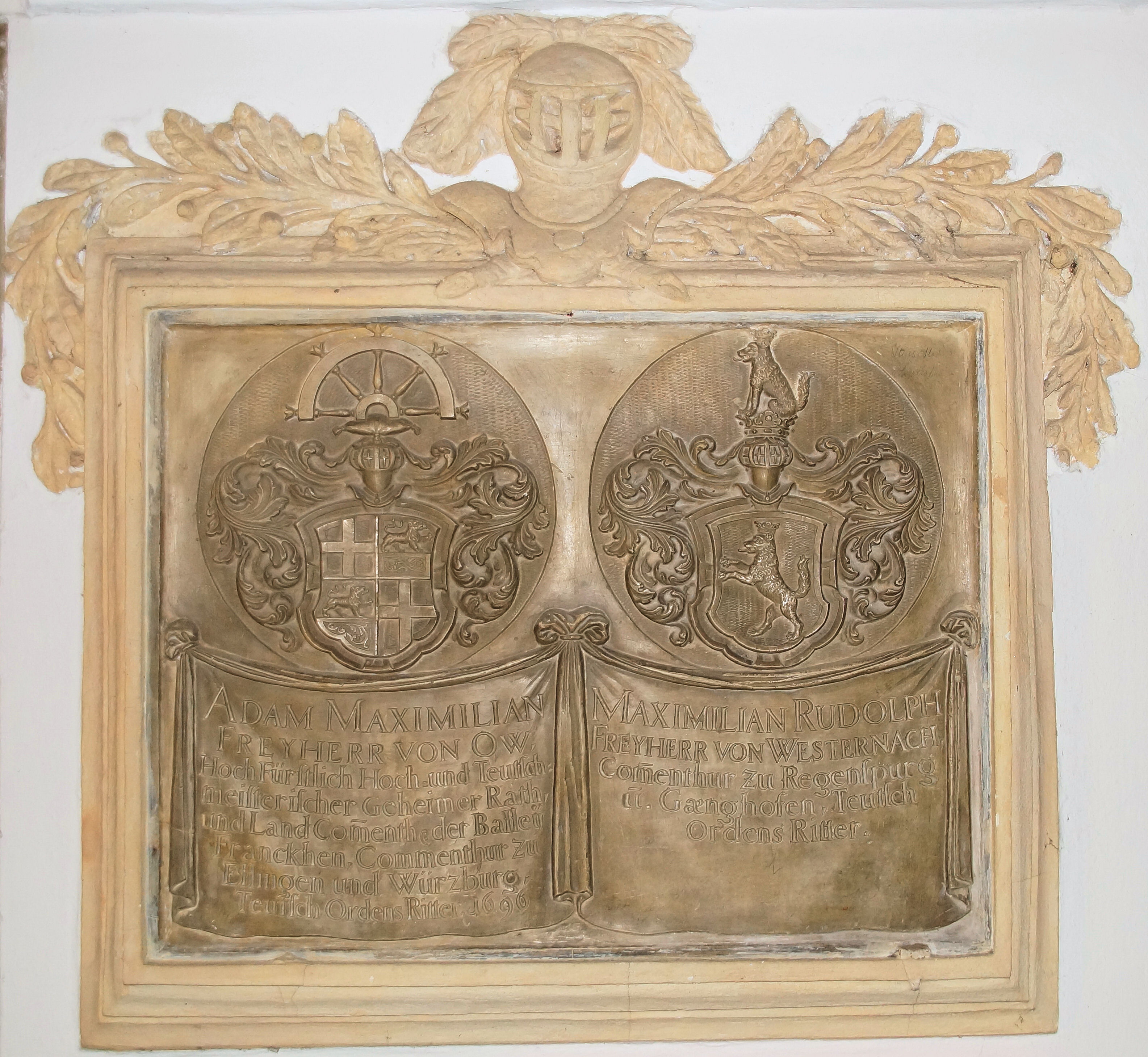 Ehem. Deutschordenskomturei, Tafel im EingangsbereichThis is a photograph of an architectural monument.